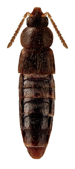 Mocyta breviuscula